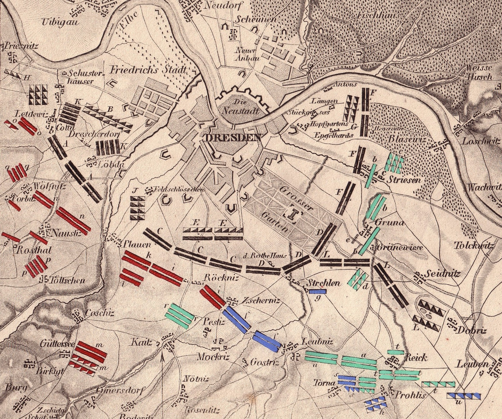 Militärische Situation der Schlacht bei Dresden am 27. August 1813. Teilkolorierter Kupferstich.